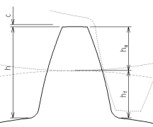 Ząb koła zębatego - rys. techniczny. Autor: Paweł Wajda, 2004